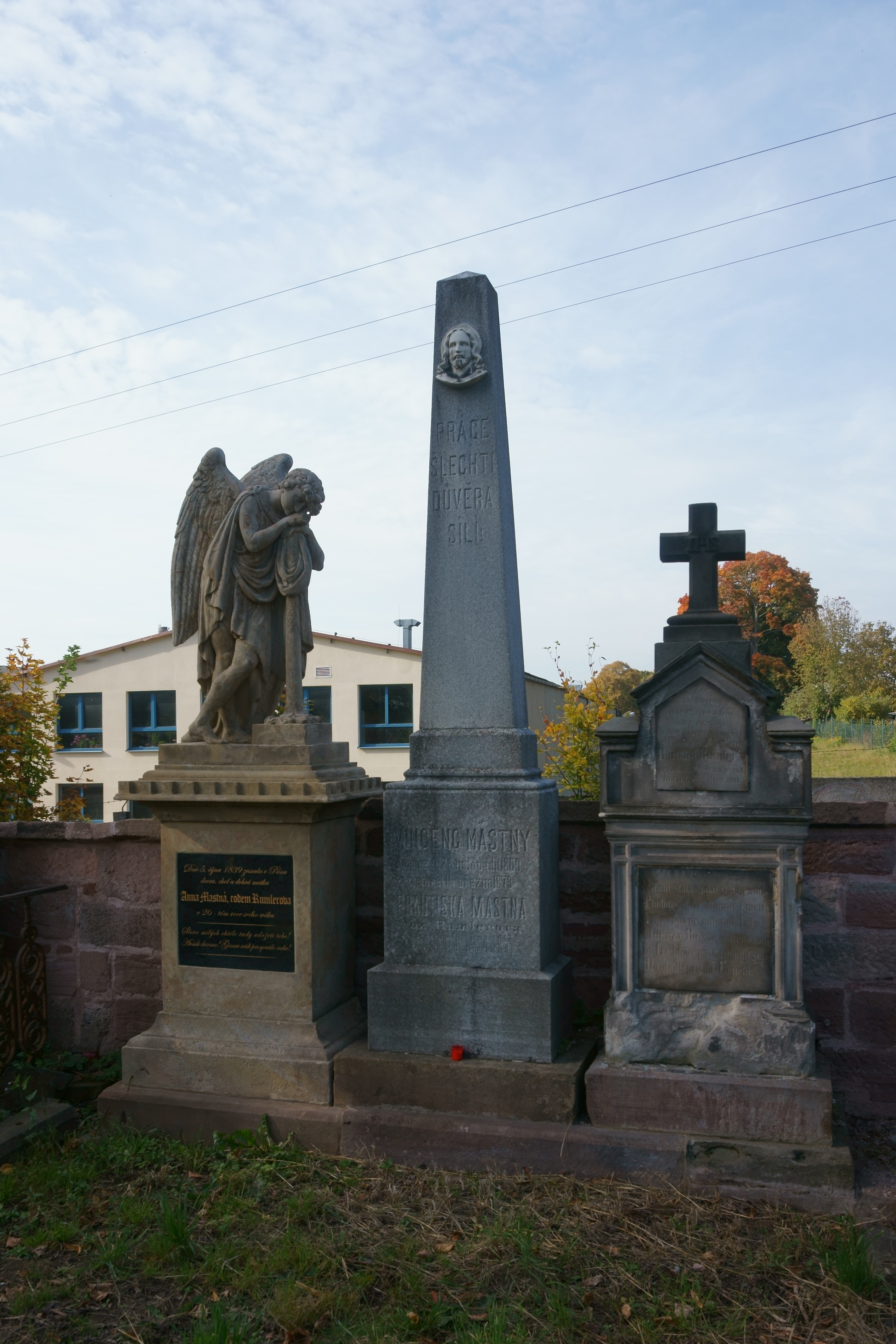 Lomnice nad Popelkou - rodina Mastných